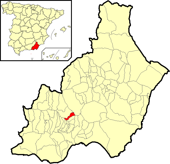 Situación del término municipal de Santa Cruz de Marchena respecto a la provincia de Almería, en España.